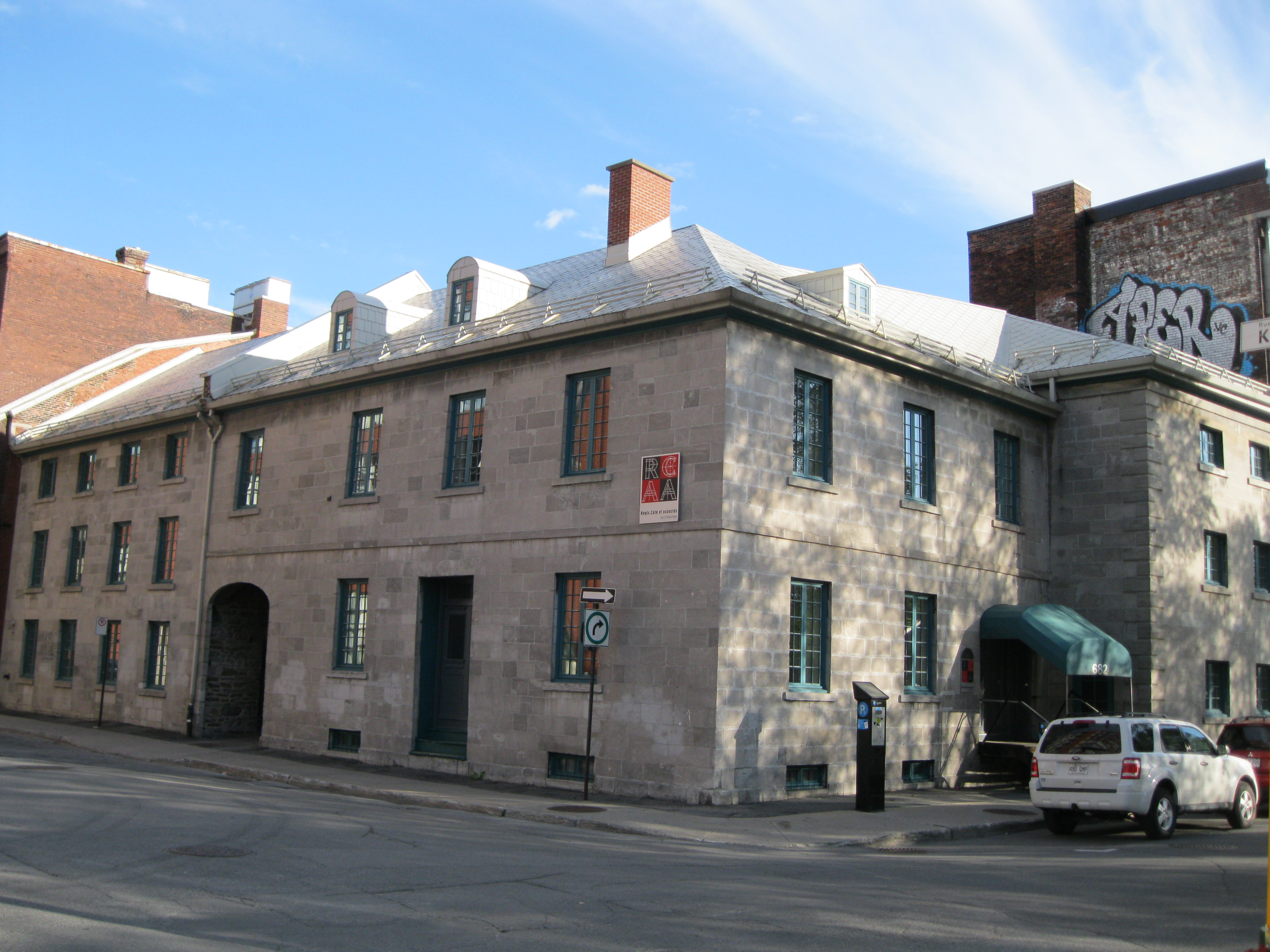 La maison Abner-Bagg est un ensemble de 3 édifices situés à l'angle des rues King et William à Montréal. Deux adresses : 166, rue King, 682, rue William.